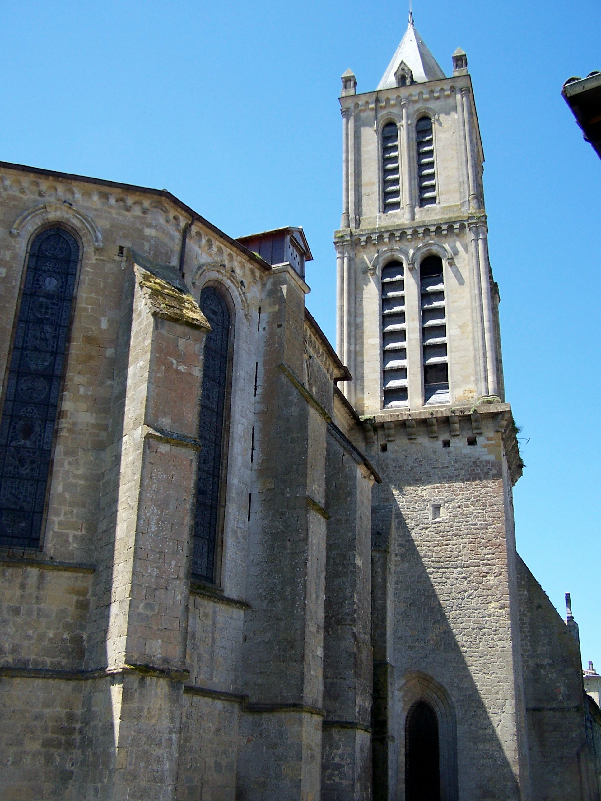 Église Saint-Pierre de La Réole, Gironde, France